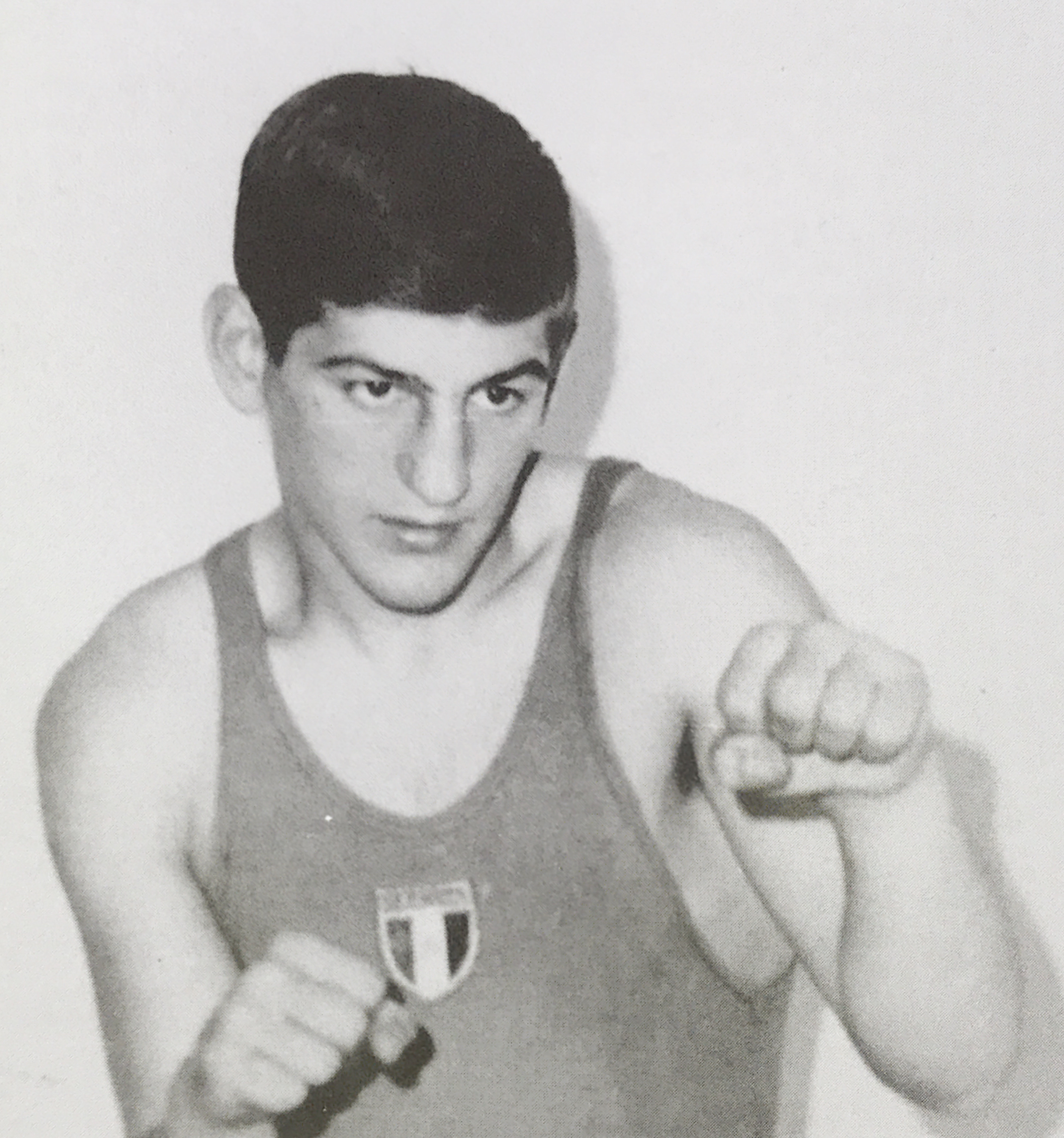 Fulvio Tognetti con la maglia della nazionale italiana